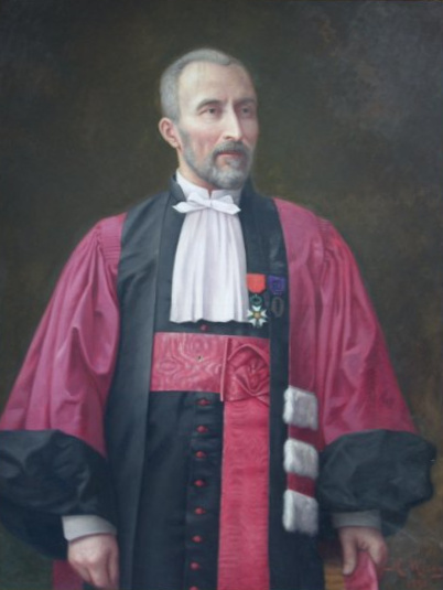 Retrat d'Hugues Charles Méray (1835-1911), matemàtic francès